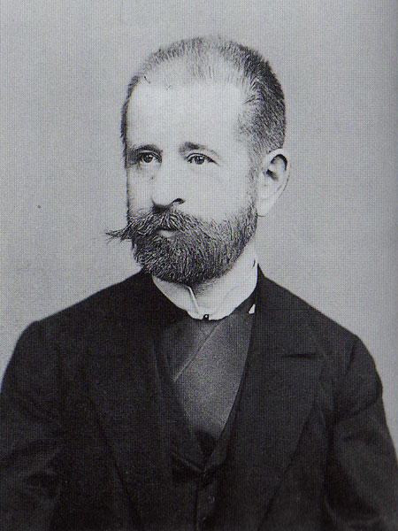 Михаило Валтровић, историчар уметности (1839-1915)